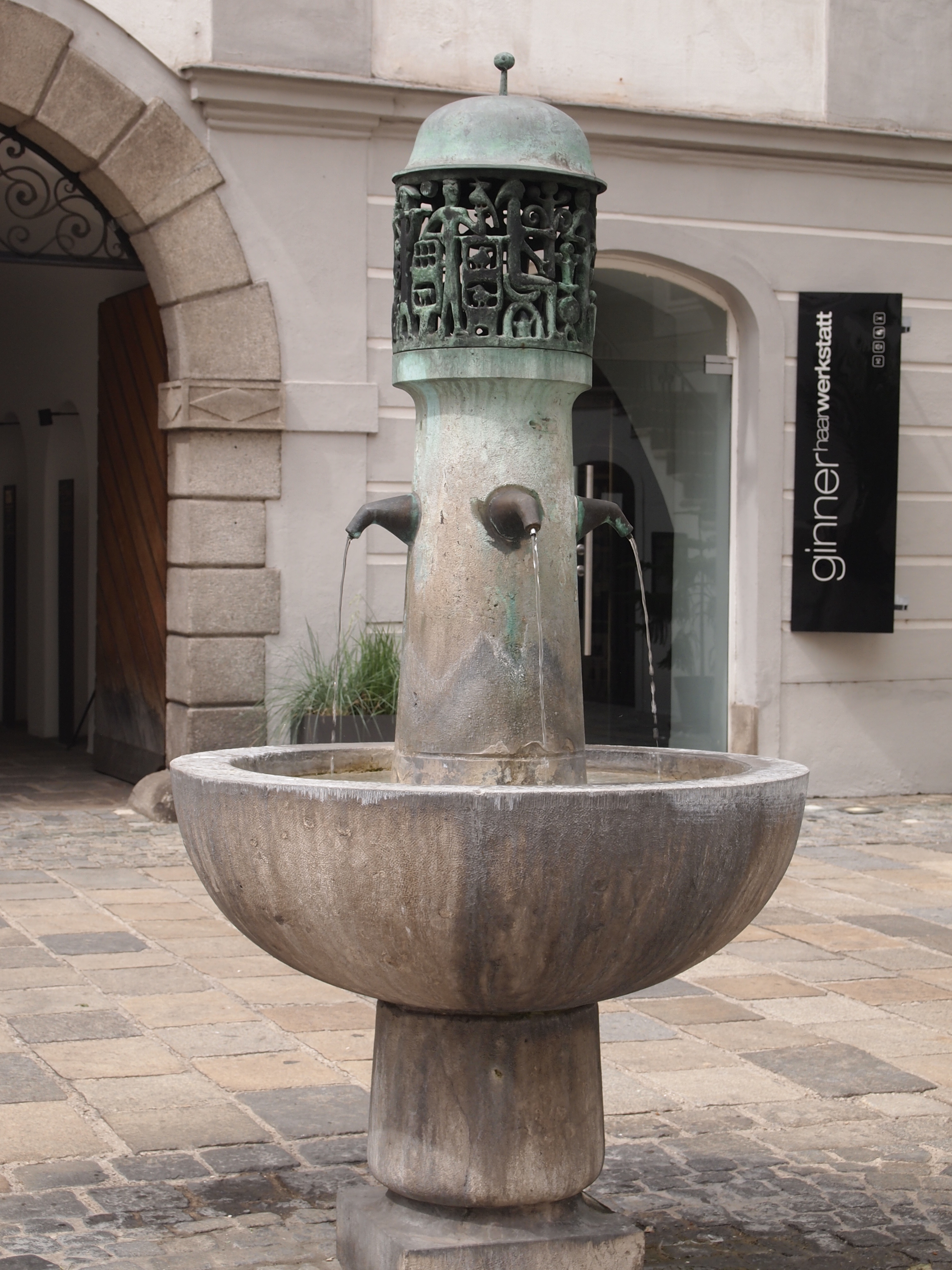 Brunnen von Ingeborg Kuba (1963) am Landhausplatz in Linz.